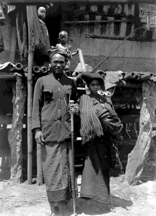 Negatief. De vrouw draagt een doek met de naam "gatip ampar" over haar schouder en zilveren oorsieraden, "padungpadung". De man draagt eventueel een "julu berjongkit" of een "ragi santik" als heupbedekking. De stel is duidelijk rijk.. De bekende Karo-Batak schaker Si Narser met zijn vrouw, Karolanden, Noord-Sumatra